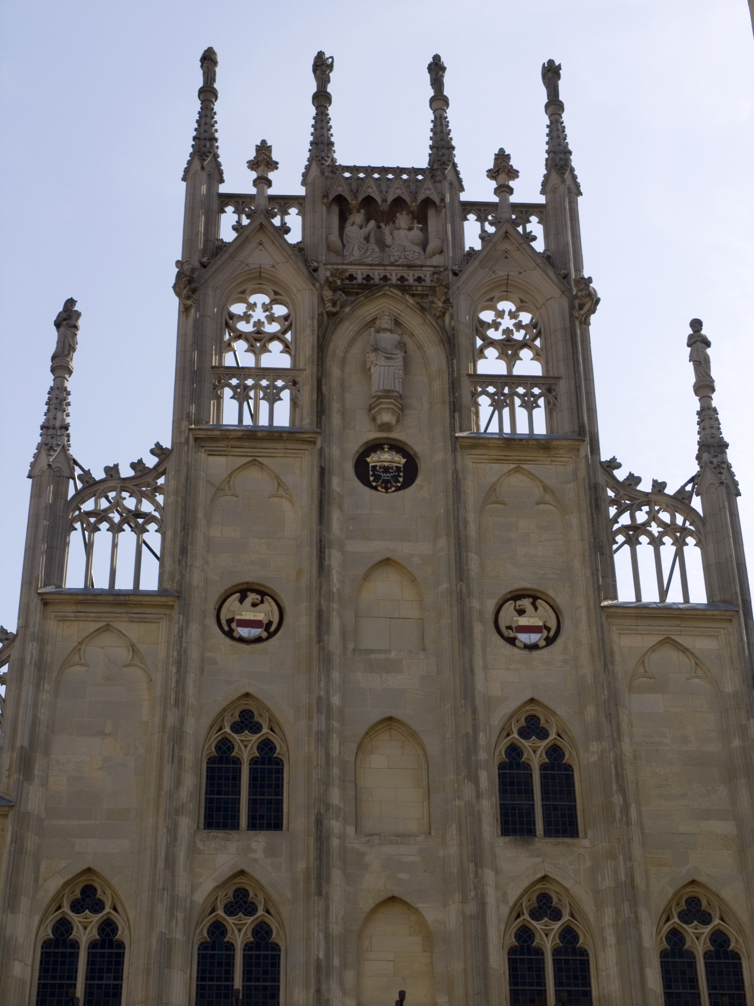 Северный Рейн - Вестфалия, Мюнстер - историческая ратуша